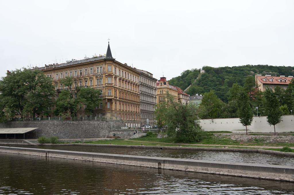 Malostranské nábřeží. Původní vtok Čertovky, dnes je voda přiváděna štolou podél plavebního kanálu (v popředí mezi zdí a nábřežím) z jeho horní části.